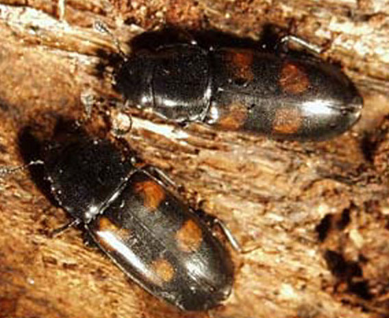 Glischrochilus quadripunctatus, cropped